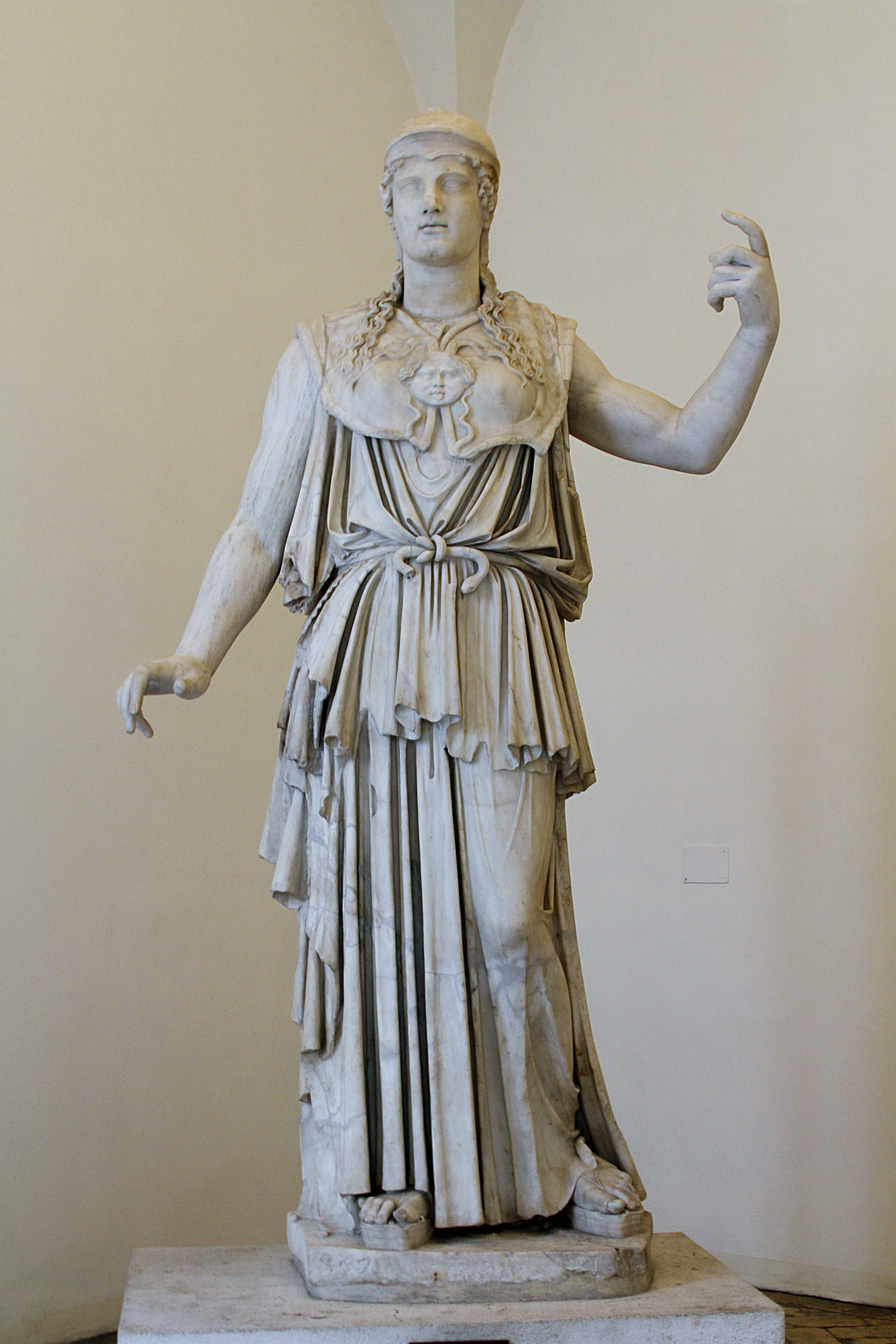 Palazzo Altemps - Rome